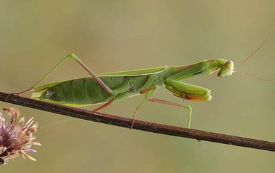 Gottesanbeterin